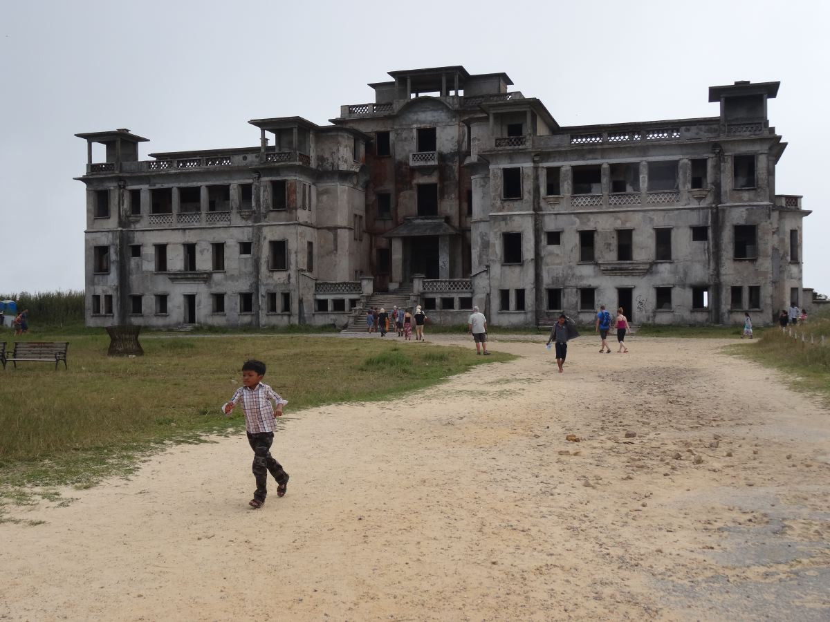 Façade sud